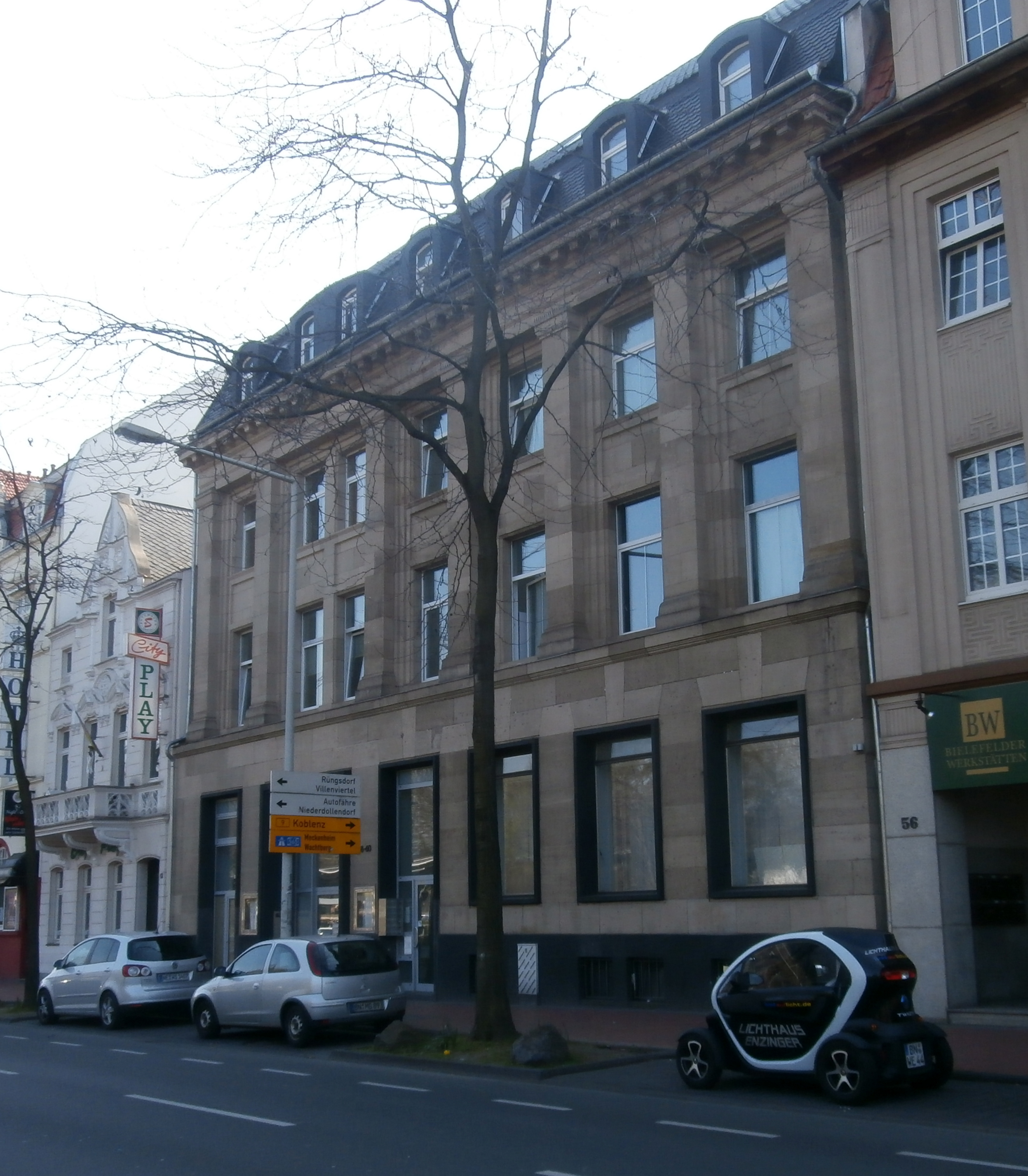 Ehemalige Filiale der Schaaffhausen'schen Bank, Moltkestraße 58–60, Bad Godesberg